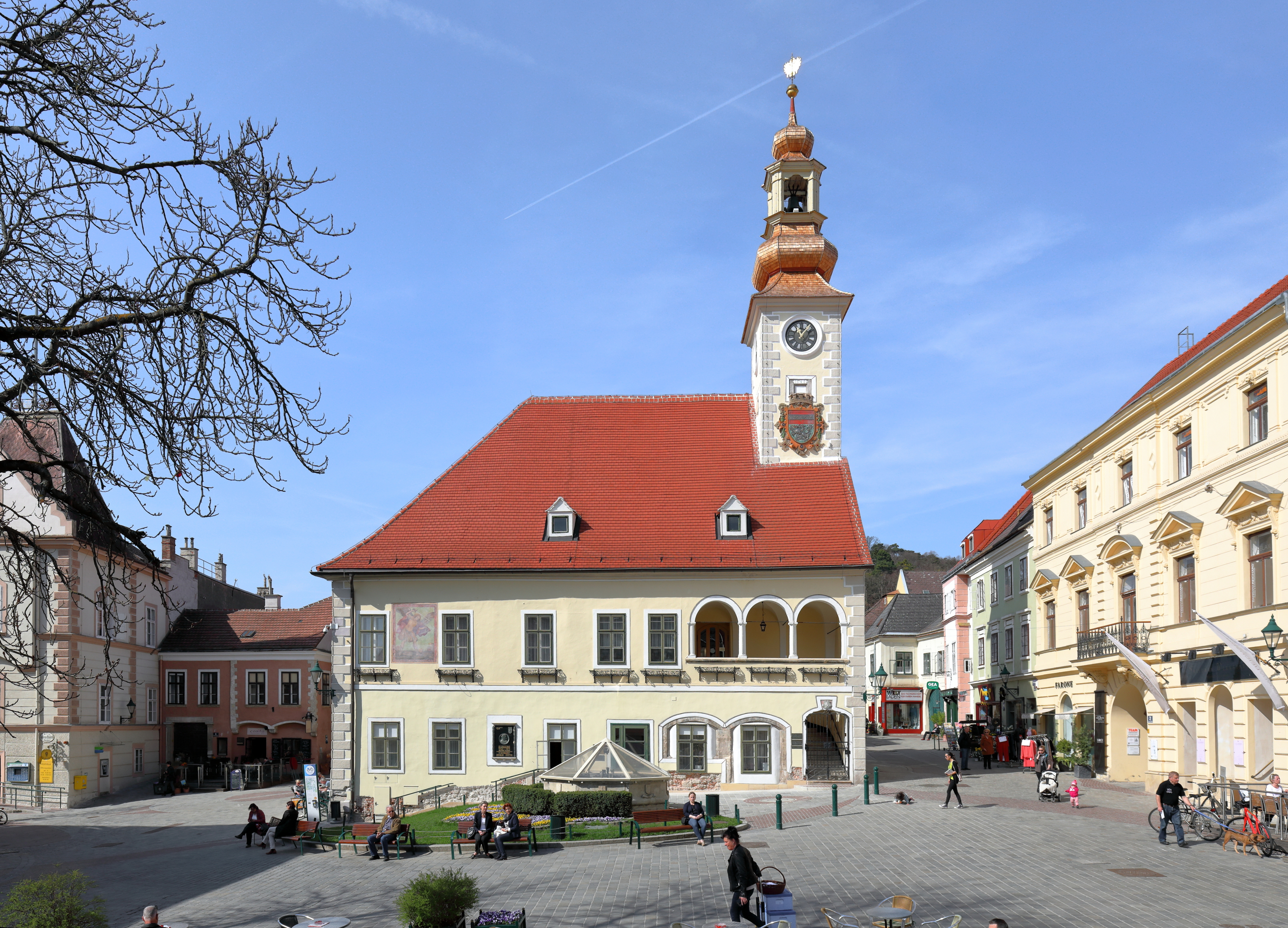 Das alte Rathaus am Schrannenplatz in der niederösterreichischen Bezirkshauptstadt Mödling.Der freistehende, zweigeschossige und im Kern gotischer Bau mit Walmdach und Turmaufsatz ist mit 1548 datiert und wurde mehrfach umgebaut und verändert.